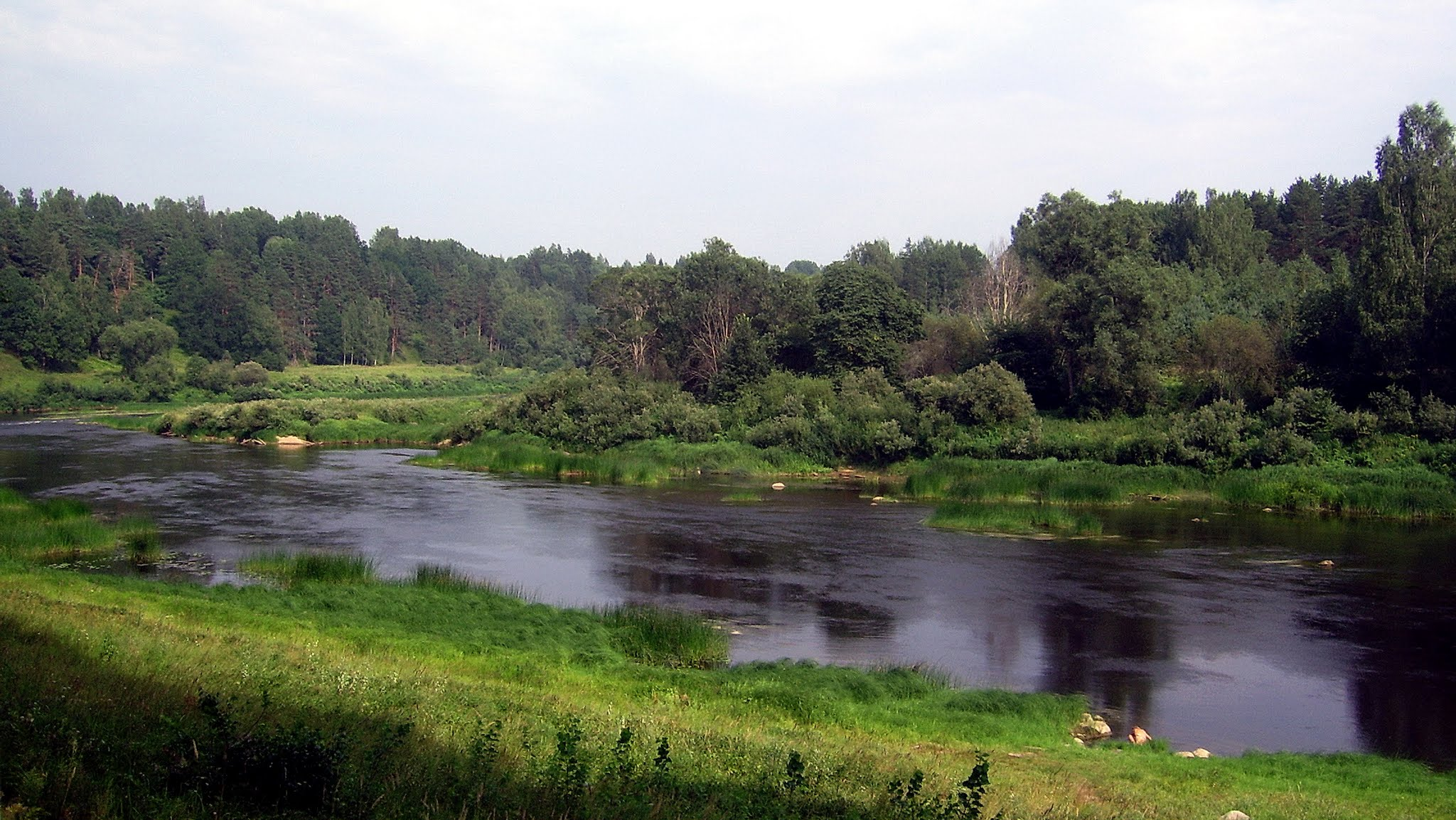 р. Ловать